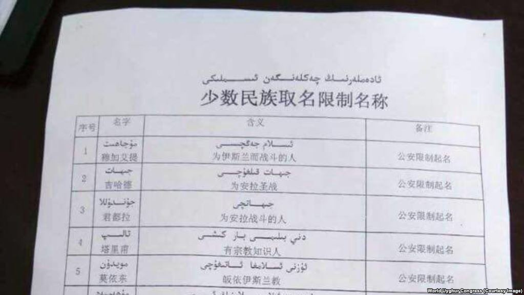 سنکیانگ میں مسلمان ناموں پہ پابندی